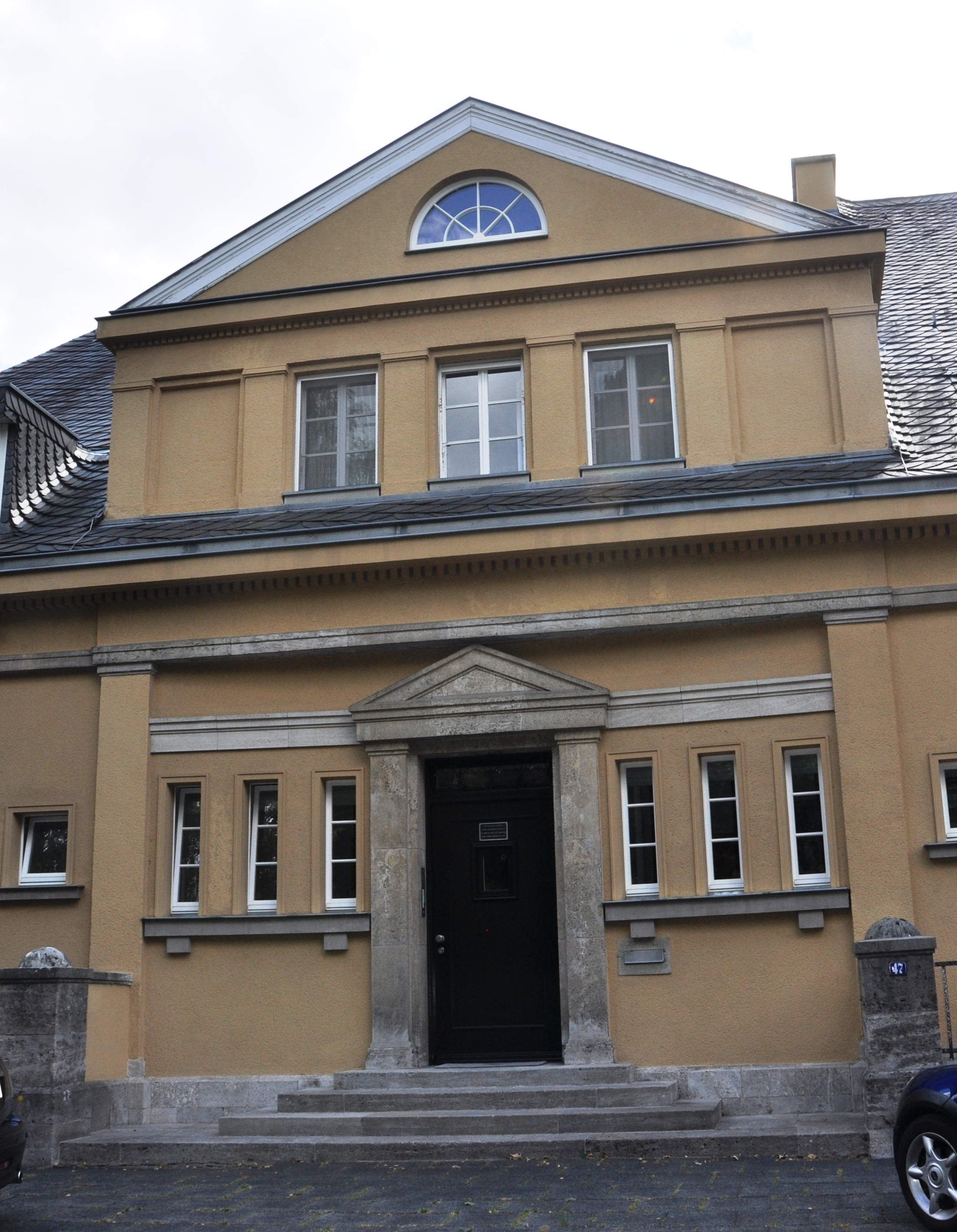 Gartenarchitekt: Fritz Encke; 1949/50–mind. 1992 Residenz der diplomatischen Mission des Großherzogtums Luxemburg This is a photograph of an architectural monument.